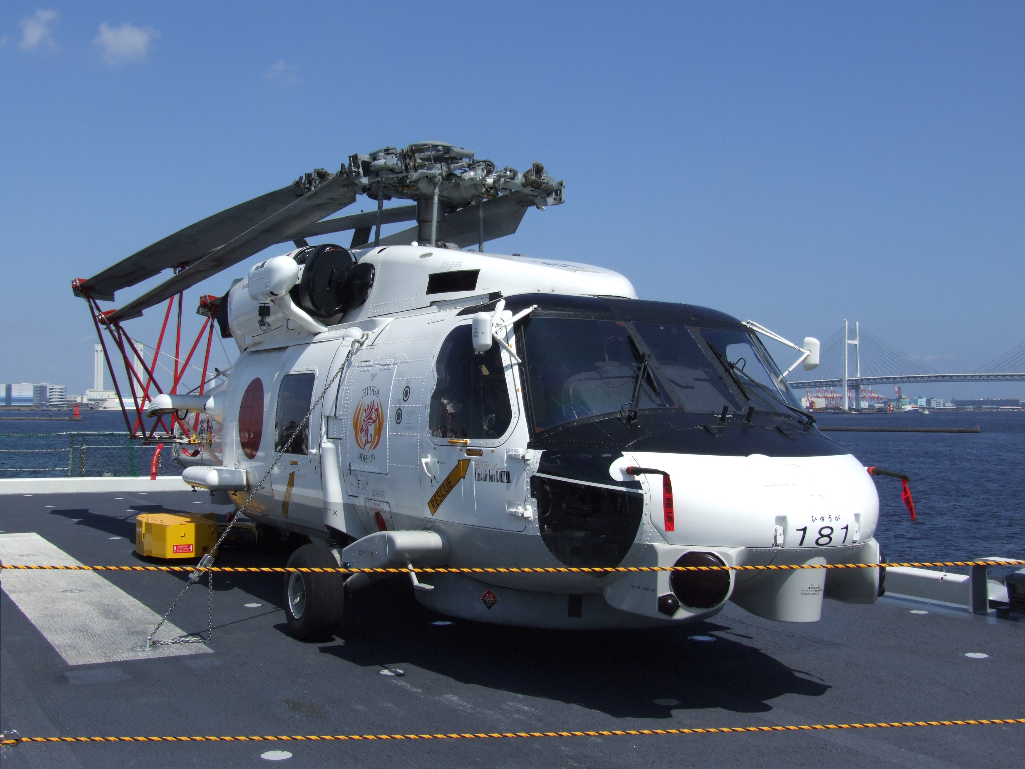 護衛艦ひゅうがの除籍された訓練用のSH-60J。 Fujifilm FinePix S9000